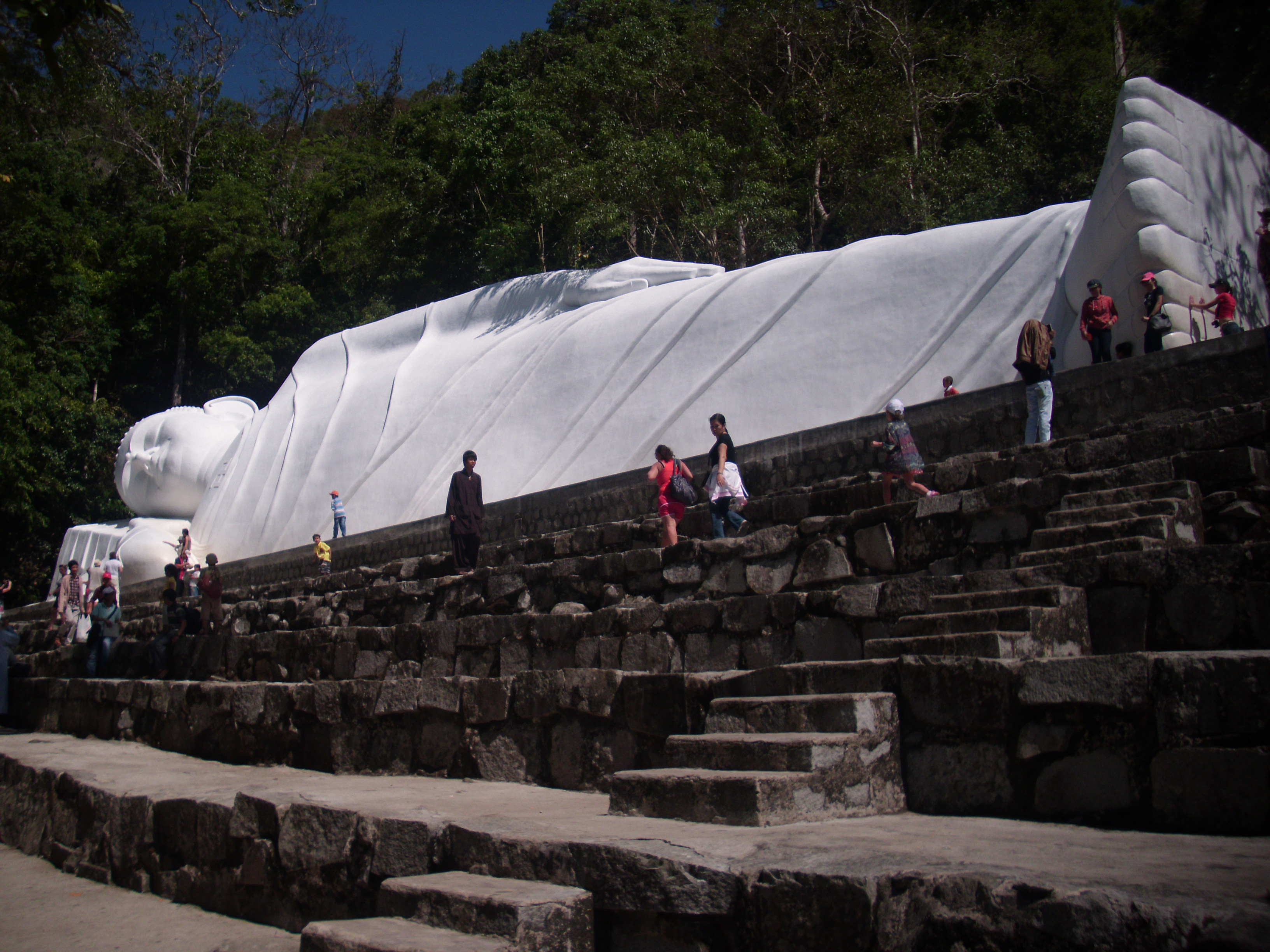 Der schlafende Buddha auf dem Núi Tà Cú ist 33m lang und 15m hoch.